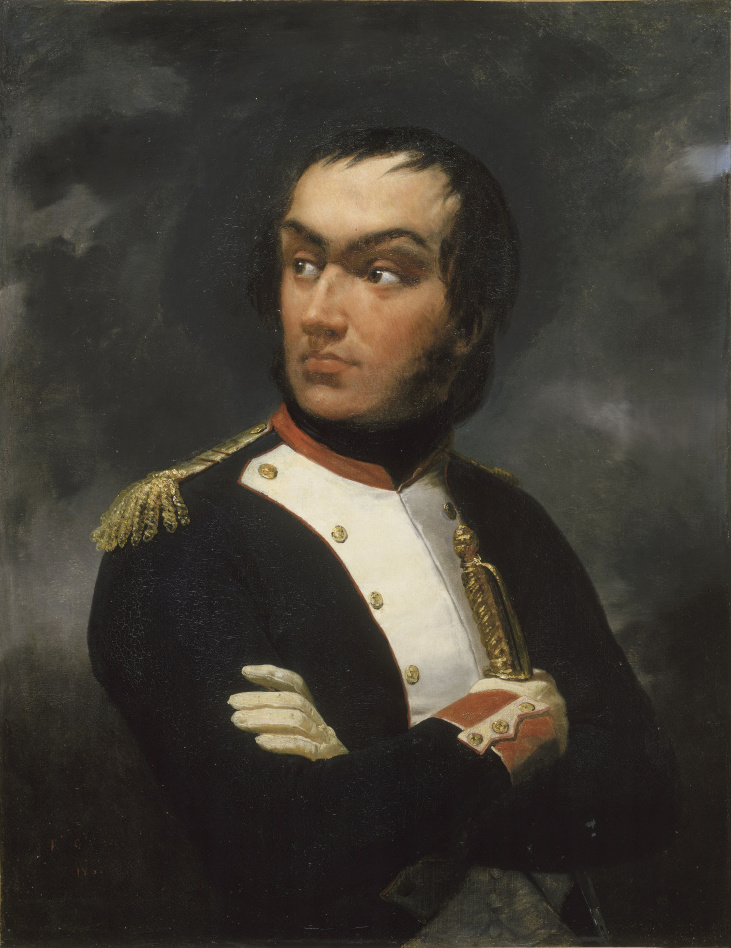 Commandé par Louis-Philippe pour le musée historique de Versailles en 1834